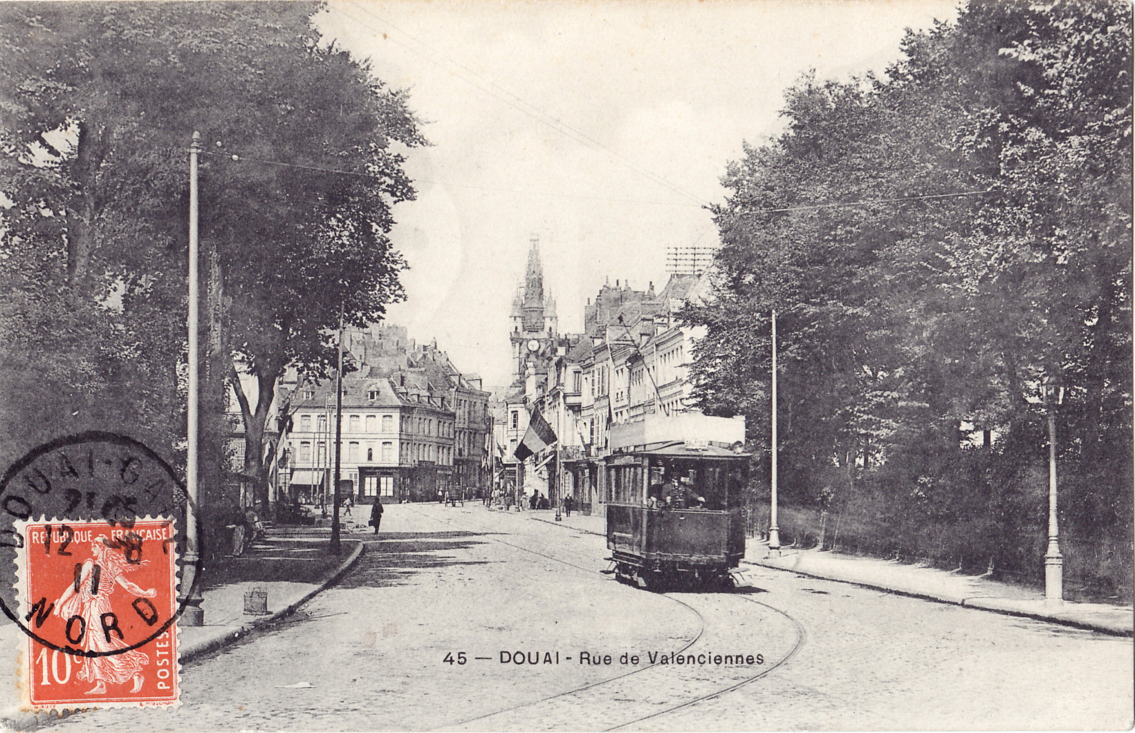 Carte postale ancienne éditée sans mention d'éditeur, n°45 : DOUAI - Rue de Valenciennes